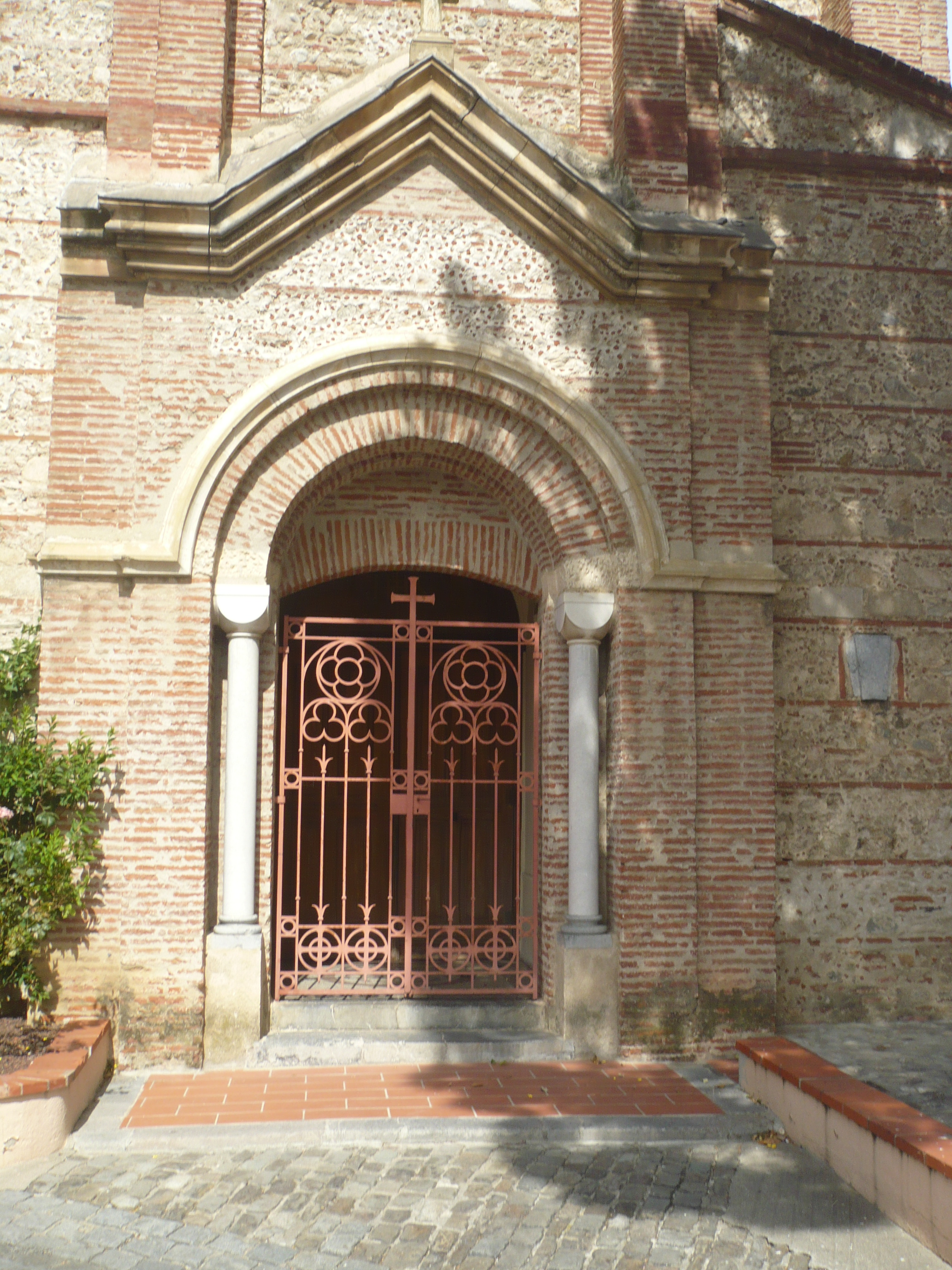 Portail de l'église Saint-Christophe à Corneilla-del-Vercol